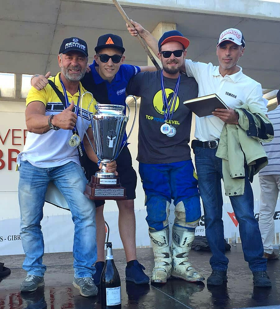 Bild von der Siegerehrung (Gibraltar-Race) in Gibraltar zeigt Helly Frauwallner inklusive Betreuerteam. v.l.: Helly Frauwallner, Thomas Freismuth (Press-Officer), Andre Frauwallner, Anton Fassold (Mechaniker)